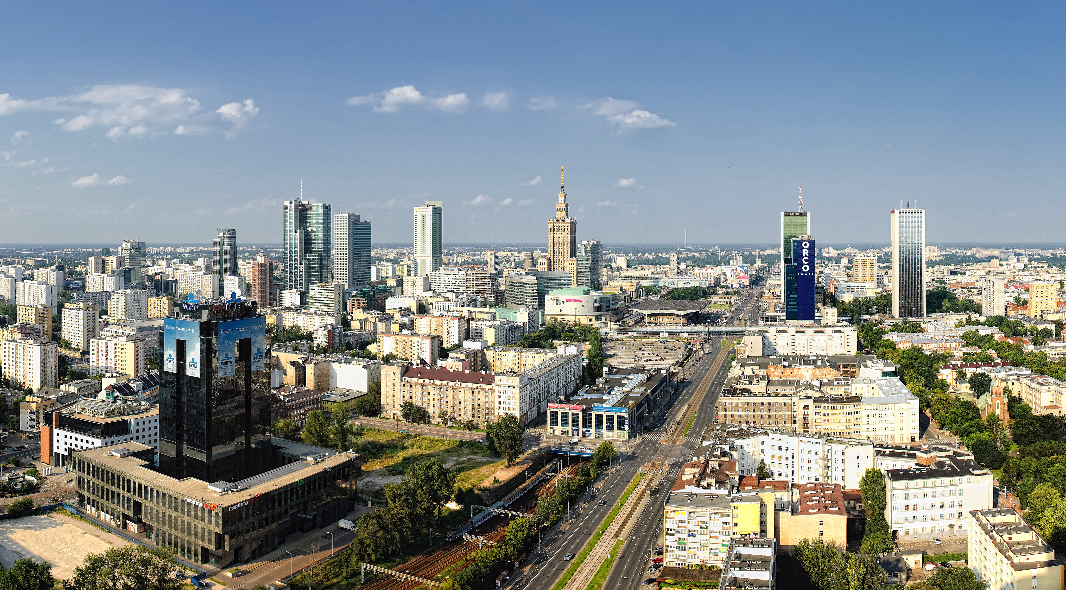 Wielkie bloki, z wielkiej płyty, wielkie bloki betonowe, wielkie bloki na osiedlach, każdy z nich jest taki sam, dziesięć pięter, cztery klatki, albo cztery piętra, dziesięć klatek, każdy z nich jest betonowy, każdy z nich jest taki sam [...] "Beton" Martin -Swoboda- Lechowicz